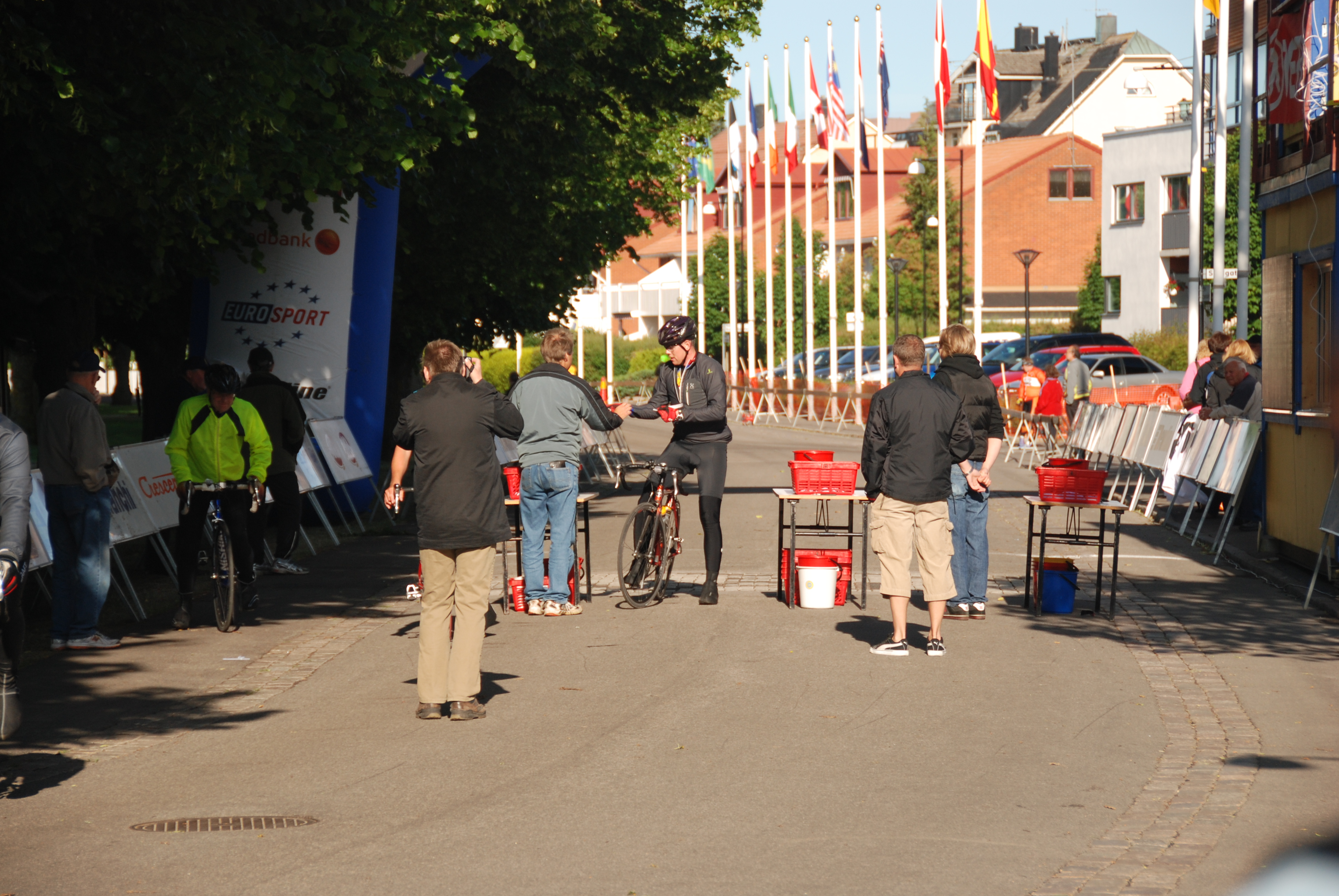 Vätternrundan, målgång, 2008